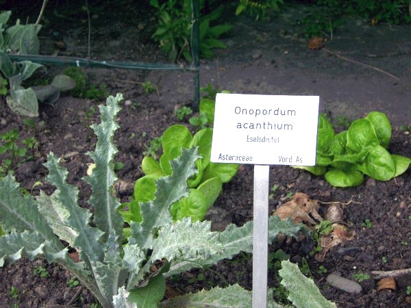 Eselsdistel (Onopordum acanthium), Botan. Garten Marburg